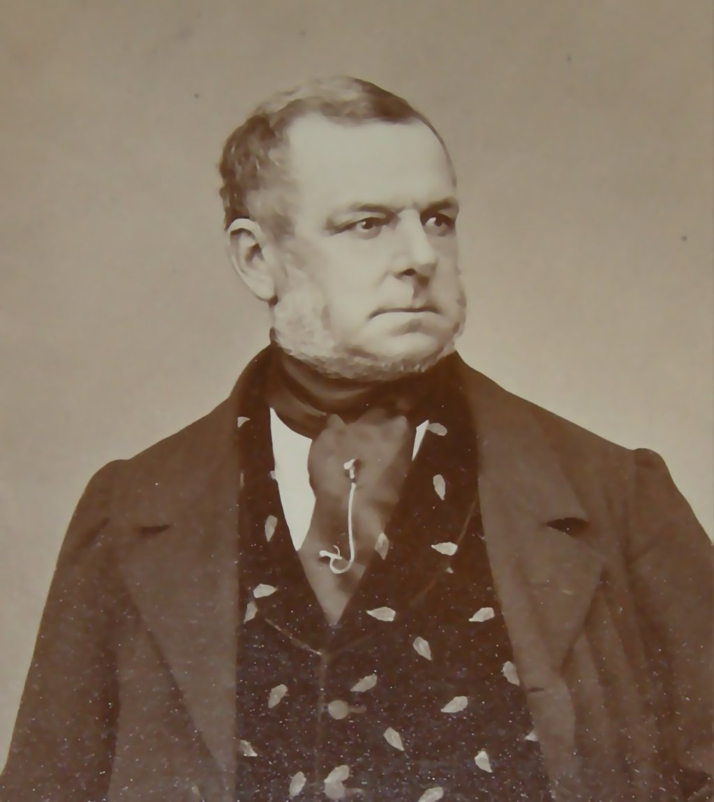 Foto von Fürst Adolf II. zu Schwarzenberg